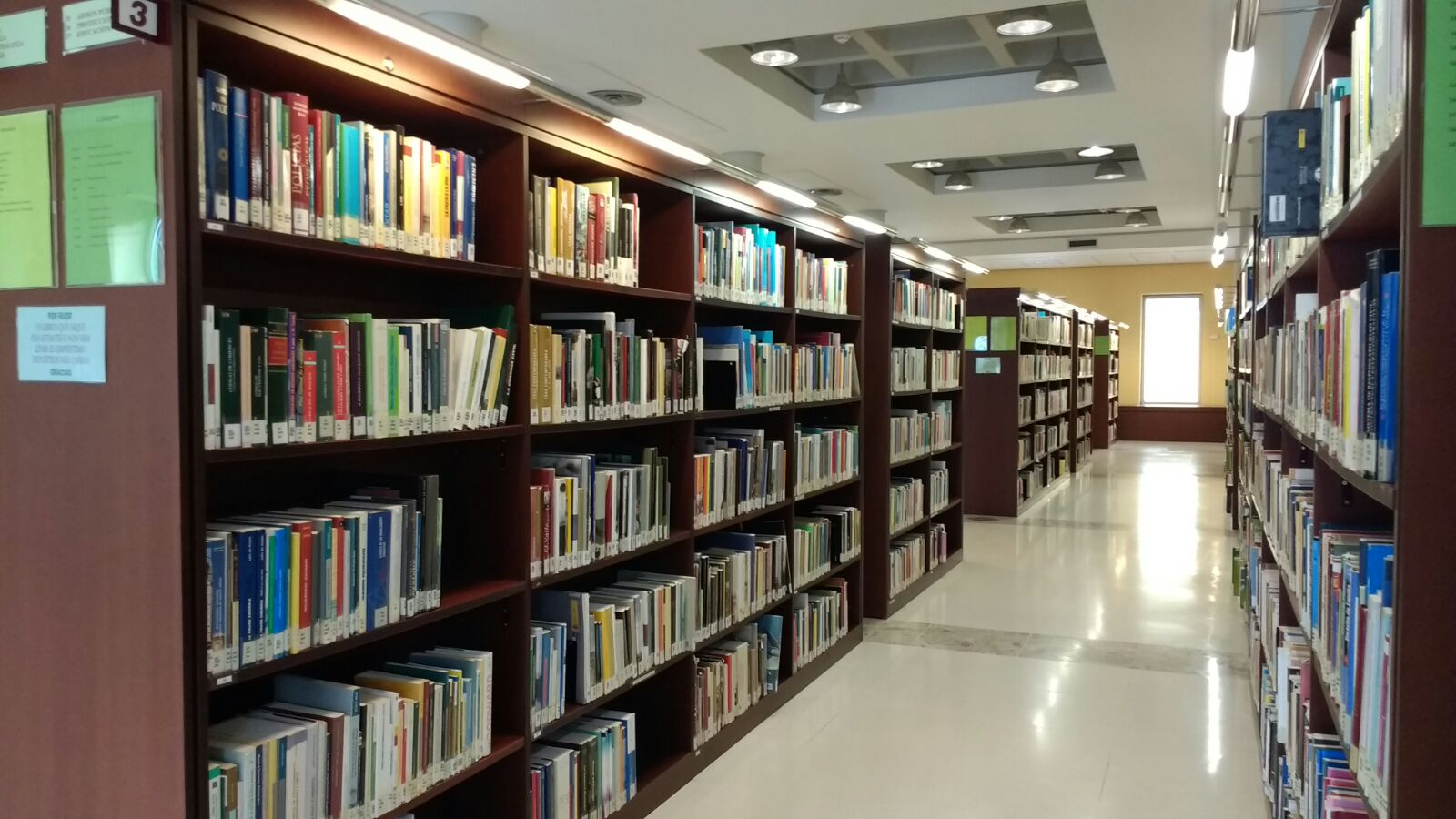 Sala de préstamo da Biblioteca Pública da Coruña Miguel González Garcés